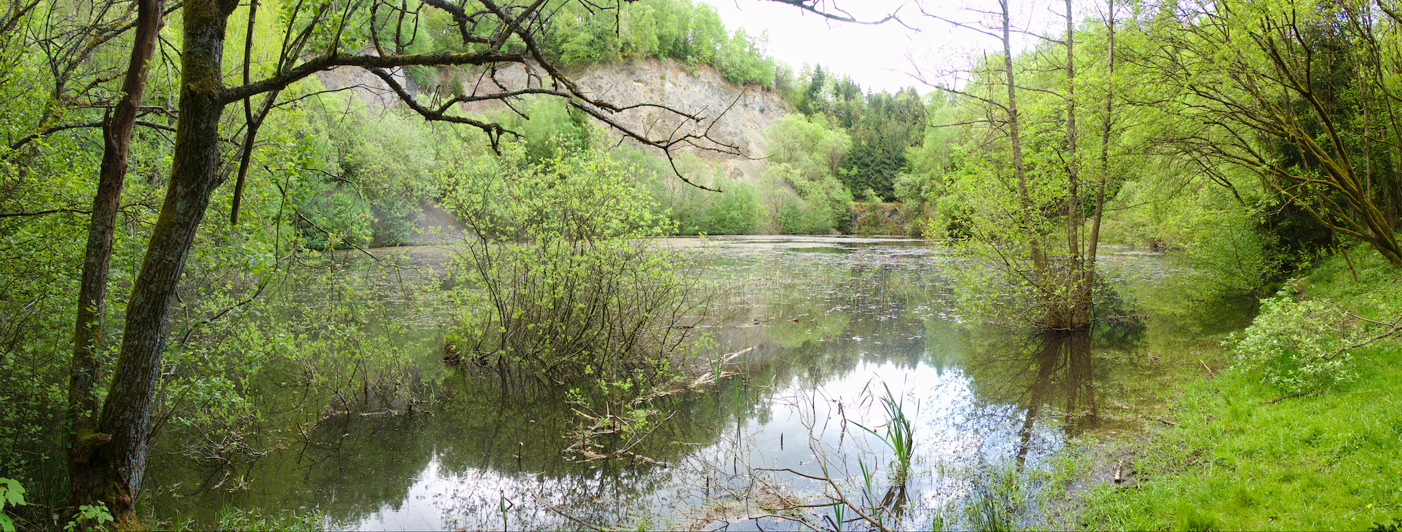 Naturschutzgebiet Schimmerich (NSG 7132-049)